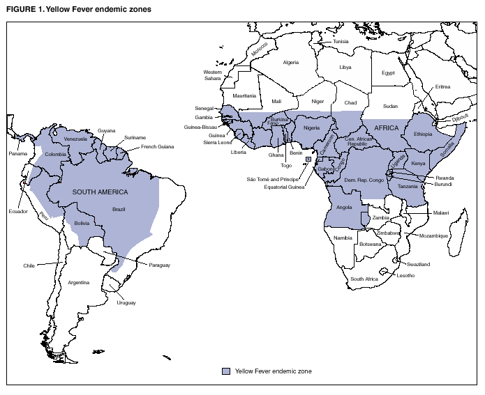 Distribuzione geografica della febbre gialla. Fonte: Centers for Disease Control and Prevention